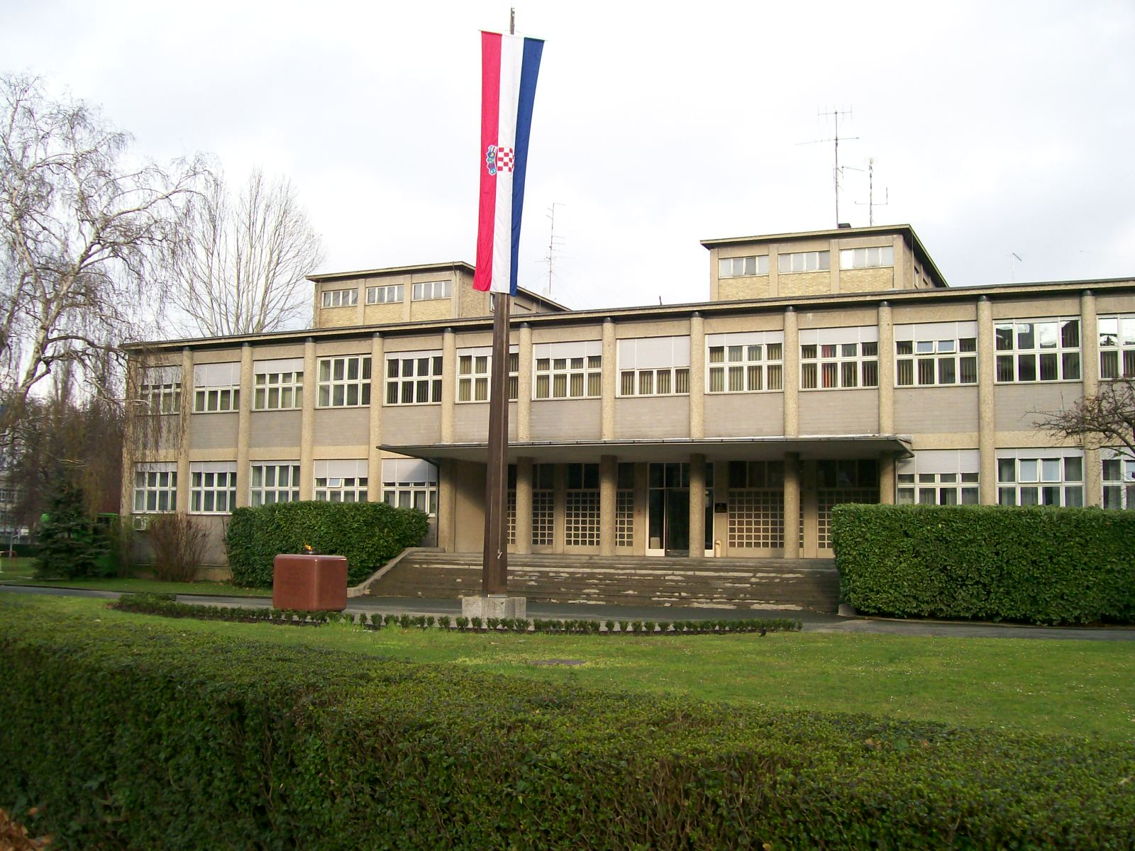 Ministarstvo unutarnjih poslova RH u Zagrebu